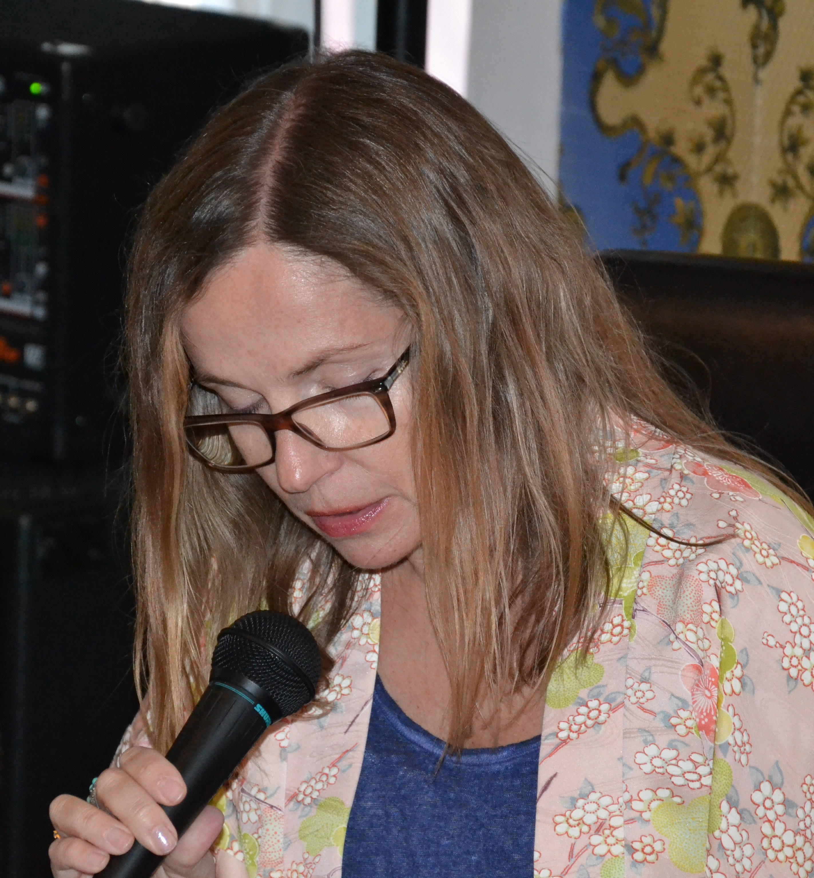 Joanna Bator w Nowej Rudzie, 9.07.2015